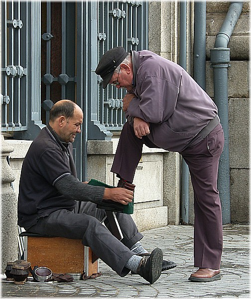 Samsung digital camera. Escena cotidiana en Oporto. al comienzo de la avenida dos Aliados.